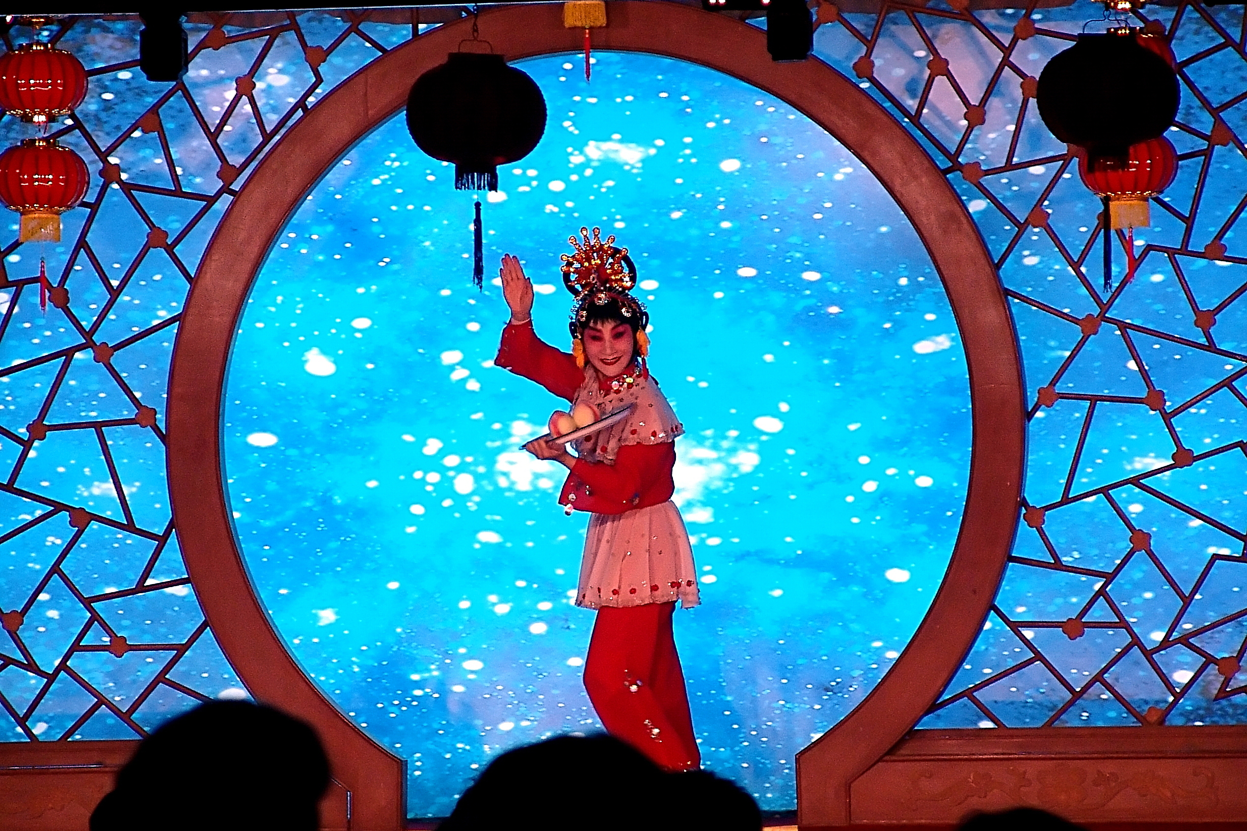 Beijing opera in Beijing.